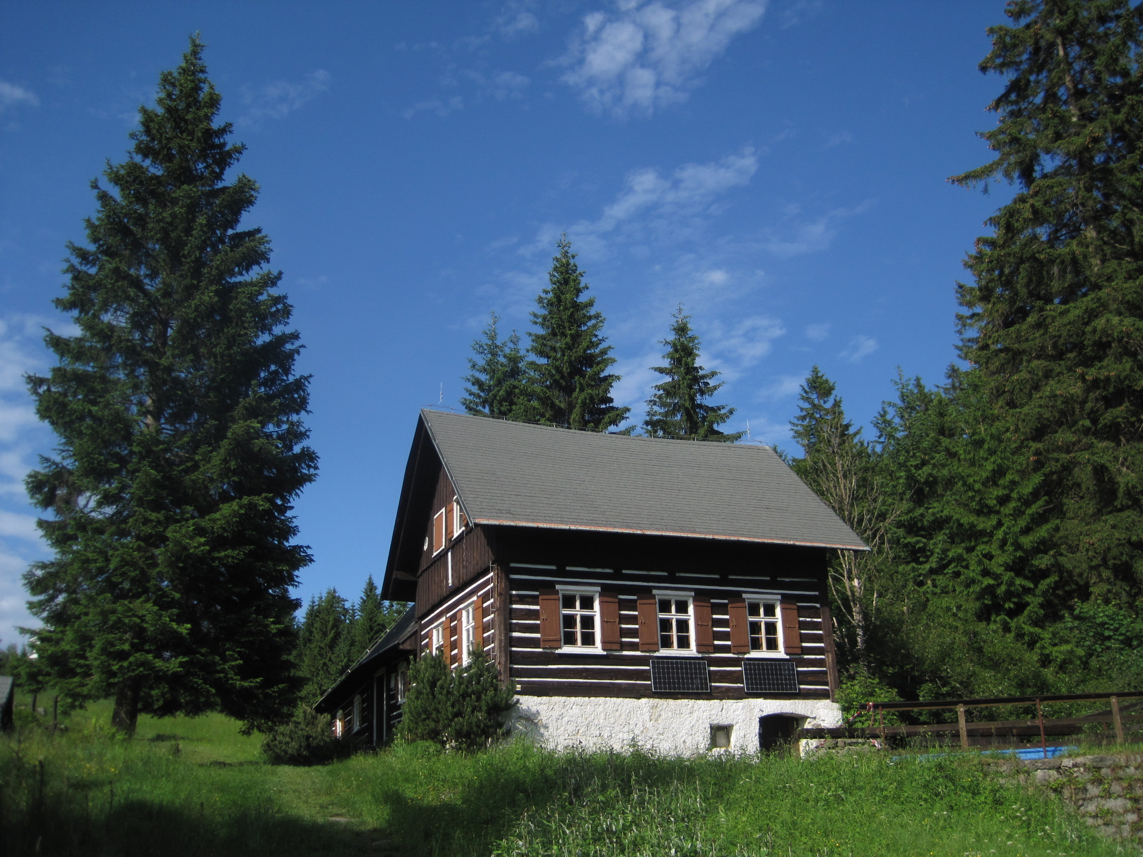 Fuchsloch - památník sklářství, Bedřichov 52, pod hřbitovem na cestě k Janovu, Bedřichov (okres Jablonec nad Nisou).